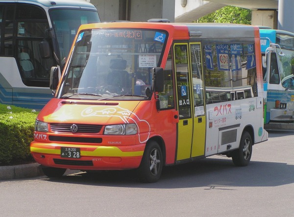 つくバス（センター循環） つくばセンターにて。2007年5月3日、投稿者が撮影。